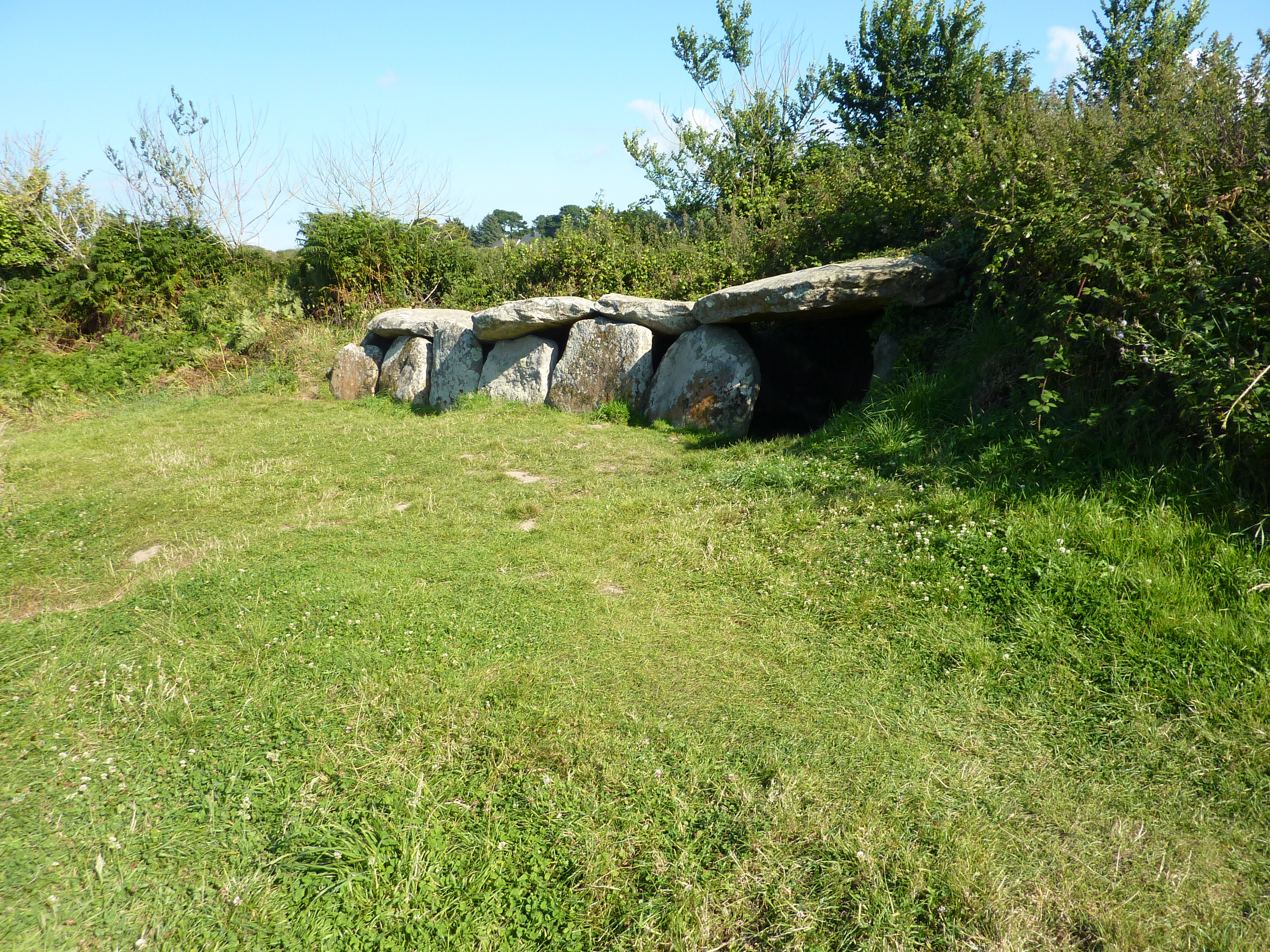 Allée couverte de Kerguntuil